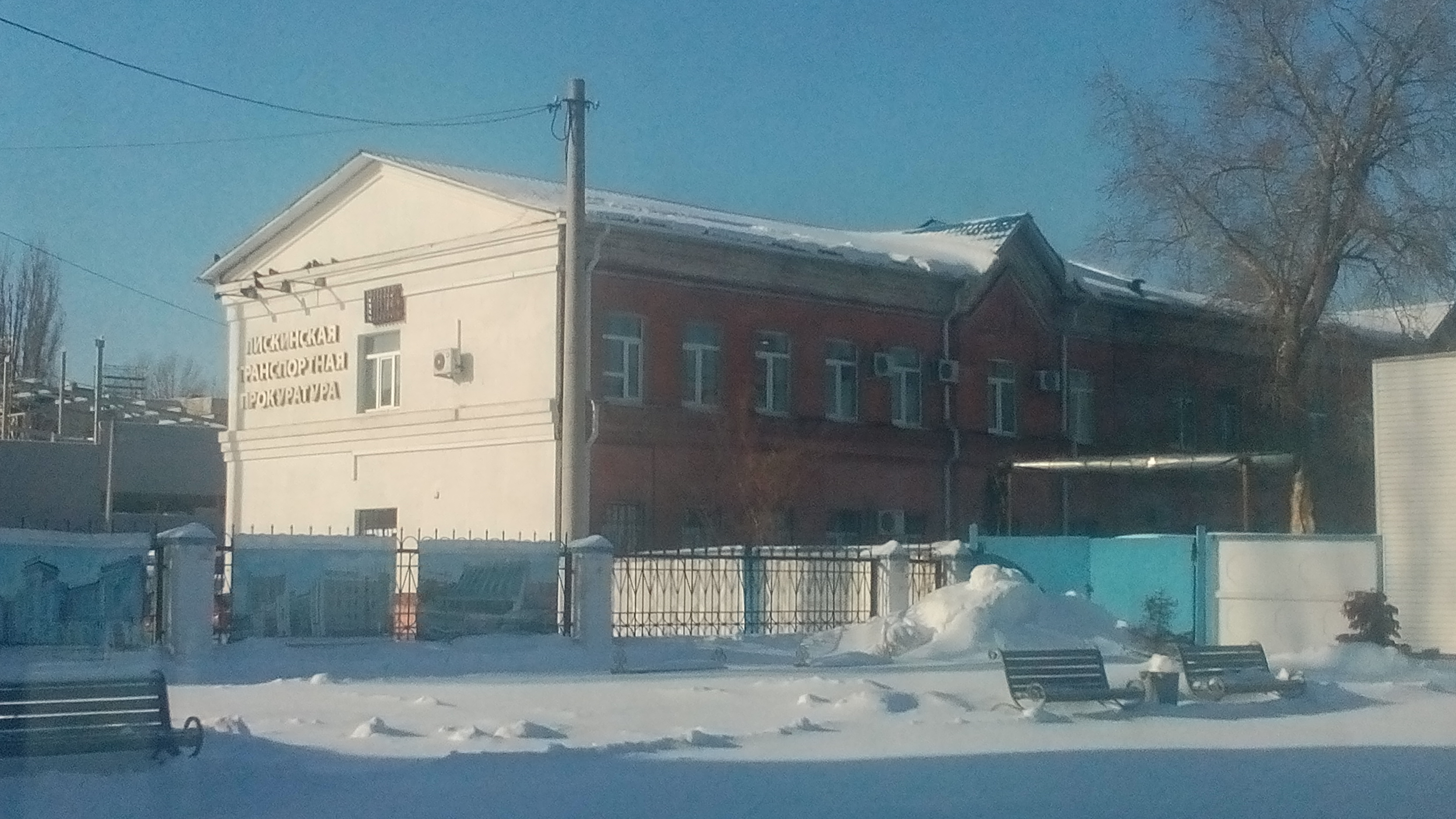 Здание транспортной прокуратуры на станции Лиски